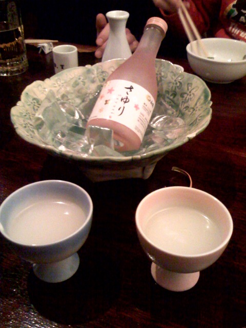 Garrafa e taças de nigori, um tipo de saquê. A bottle and two glasses of nigori sake.